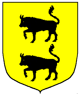 Escut de la Varvassoria de Toralla (Toralla i Serradell, Conca de Dalt, Pallars Jussà)